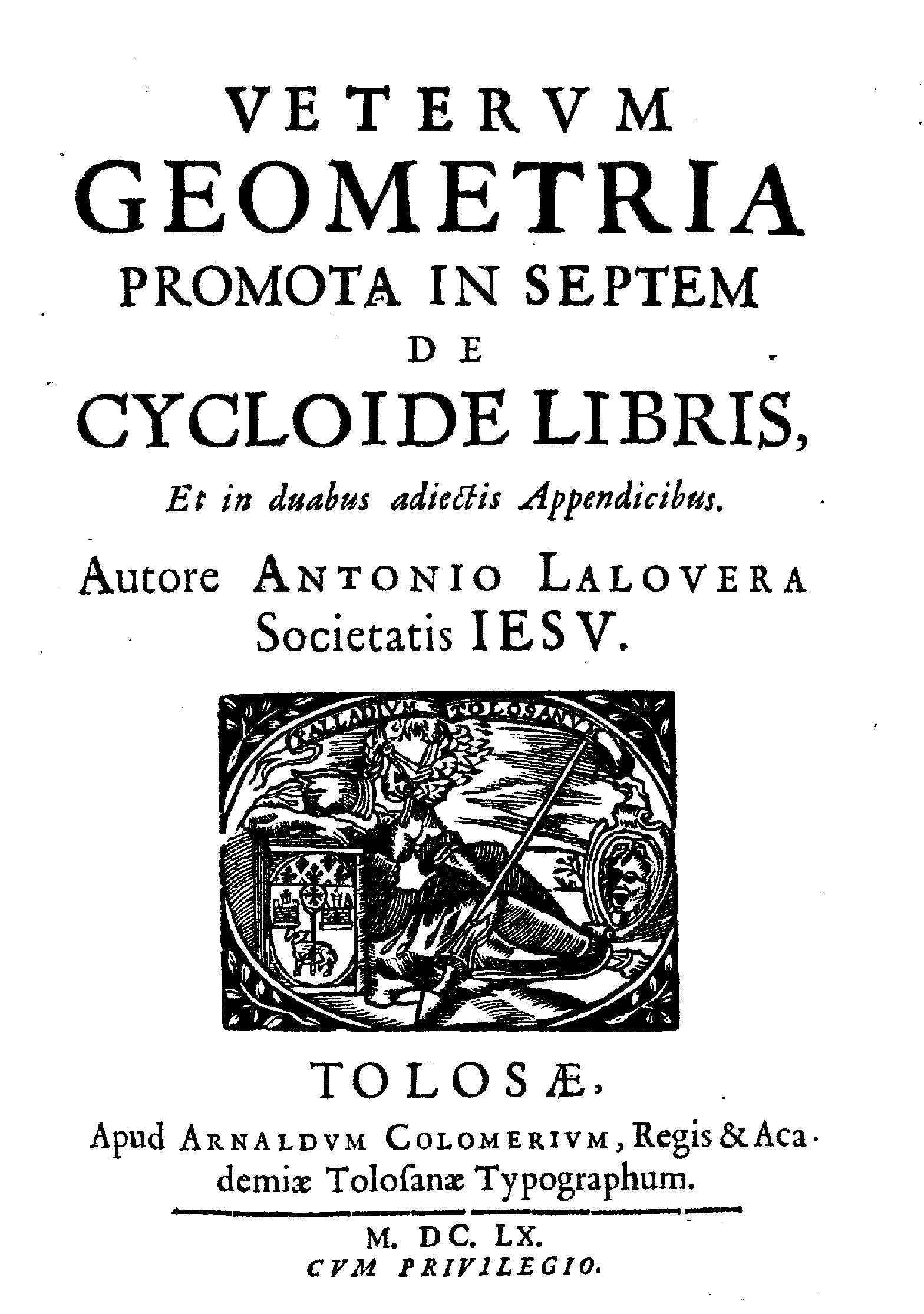 Frontespizio